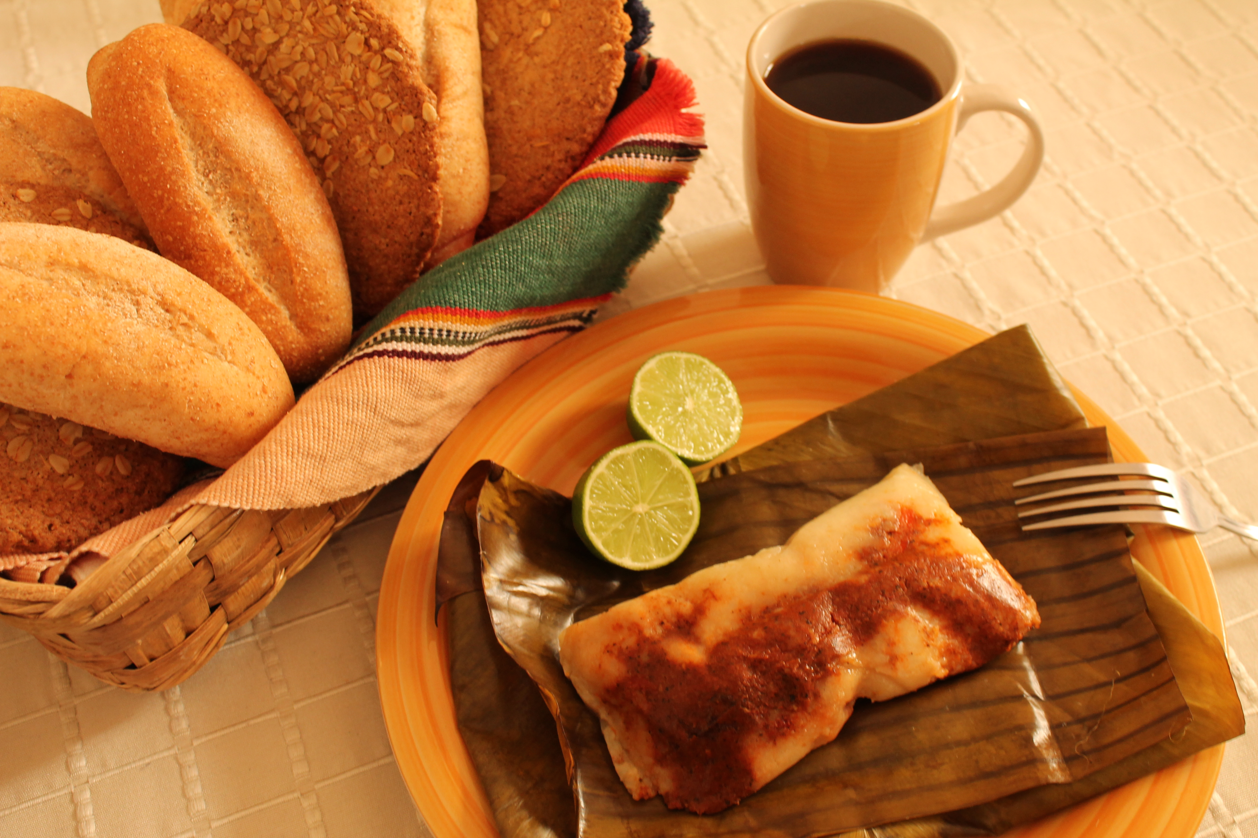 Clásico tamal colorado guatemalteco, acompañado de pan y café como comúnmente se come en el desayuno guatemalteco.